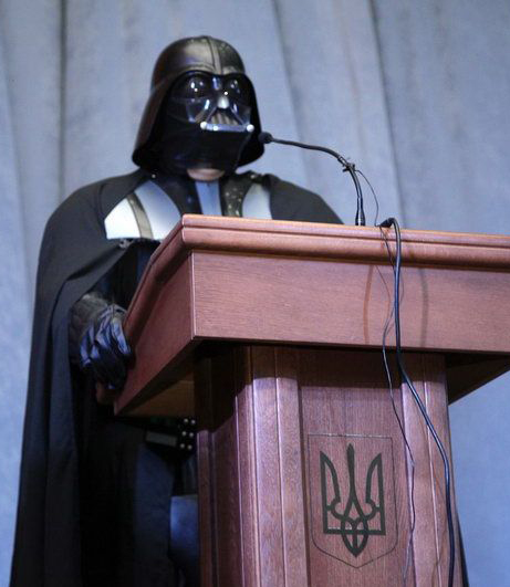 Дарт Вейдер зачитывает свою предвыборную программу.